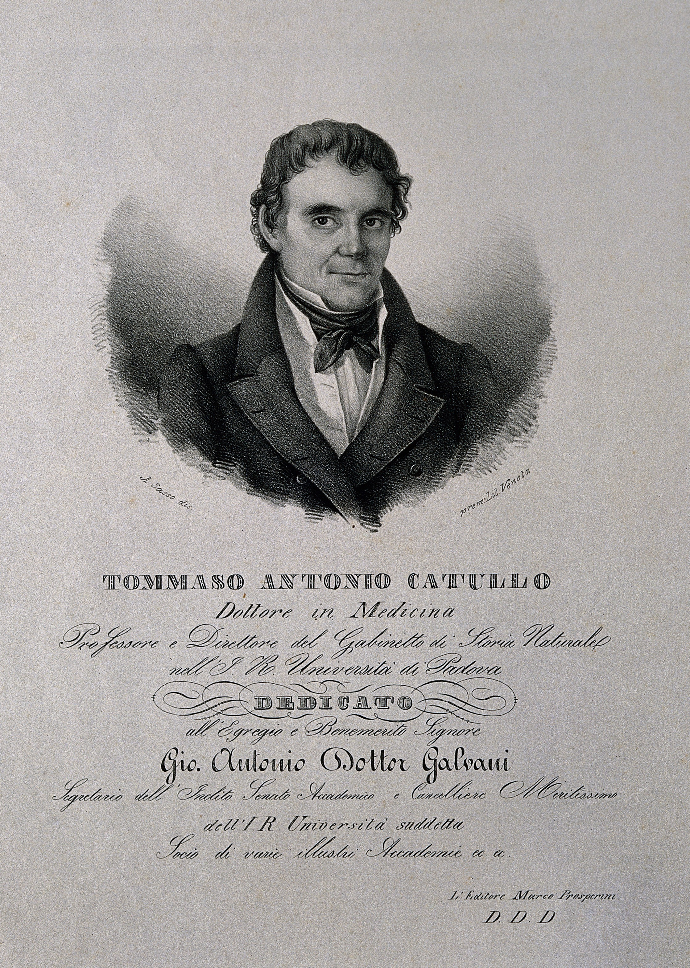 Genre/Technique: Portrait prints. Lithographs. Subject name: Catullo, Tommaso Antonio, 1782-1869.